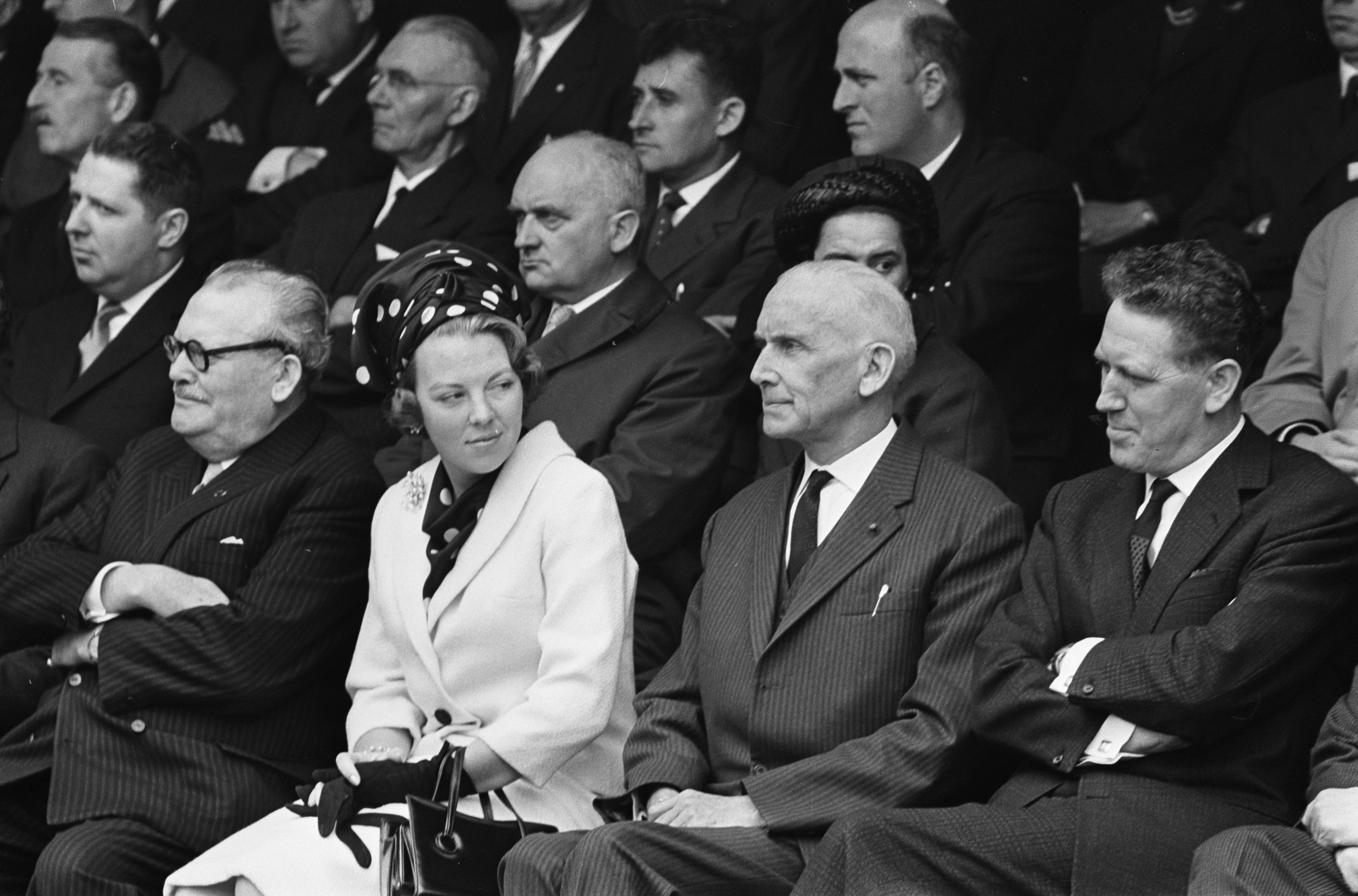 Collectie / Archief : Fotocollectie Anefo Reportage / Serie : [ onbekend ] Beschrijving : Prinses Beatrix in Brugge, eerste steen gelegd voor de bibliotheek Europacollege, Prinses Beatrix tijdens rondgang Datum : 4 juni 1965 Locatie : Brugge Trefwoorden : bibliotheken, prinsessen, rondgangen Persoonsnaam : Beatrix, prinses Fotograaf : Koch, Eric / Anefo Auteursrechthebbende : Nationaal Archief Materiaalsoort : Negatief (zwart/wit) Nummer archiefinventaris : bekijk toegang 2.24.01.05 Bestanddeelnummer : 917-8423